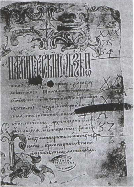 Кіева-Пячэрскі пацярык (16 ст.) з шыфрам бібліятэкі Жыровіцкага манастыра